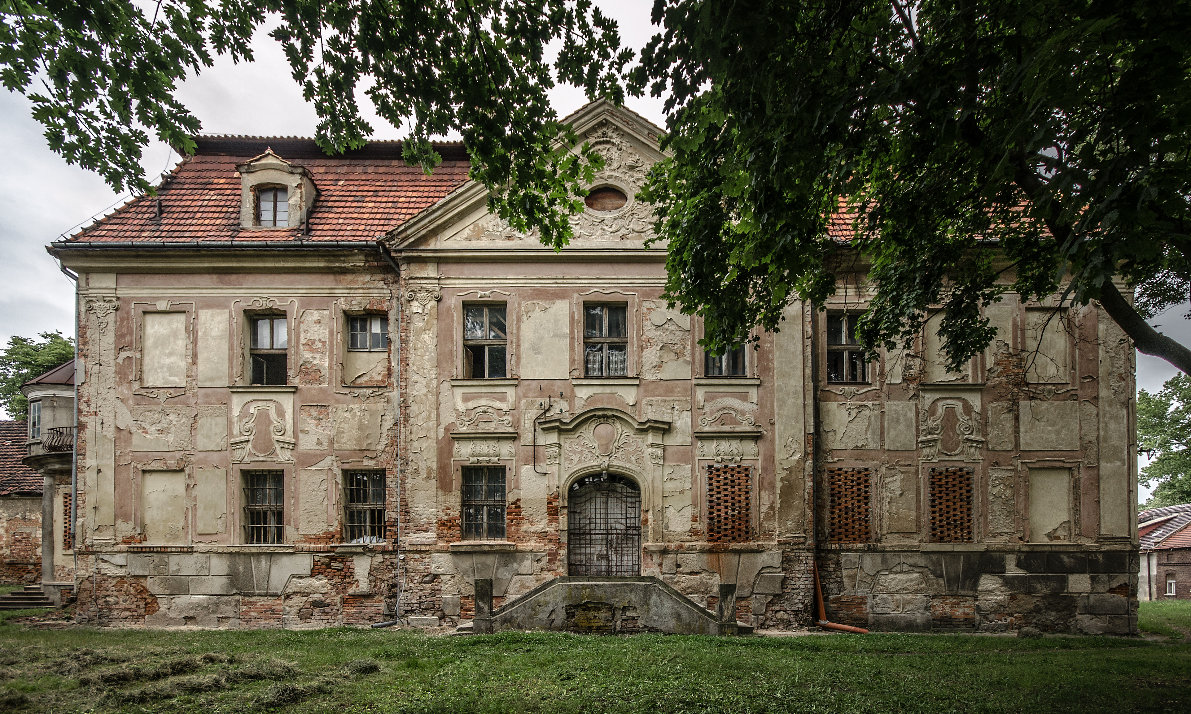 Żukowice, pałac, 1743. Widok od strony parku.